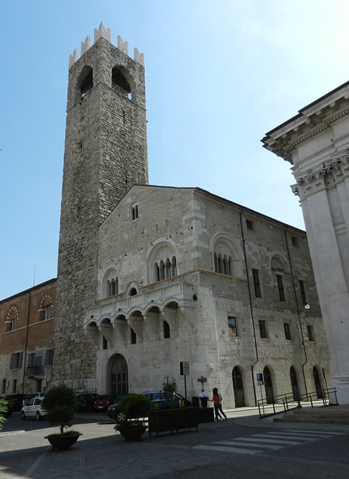 Brescia - Broletto